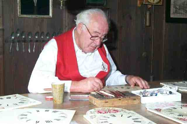 Uhrenschildmaler Wohl der letzte gelernte Schwarzwälder Uhrenschildmaler bei der Arbeit